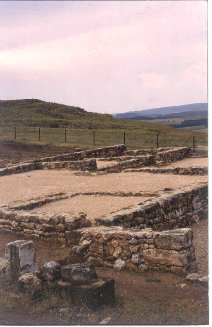 Casas de Uxama Argaela (El Burgo de Osma, Soria, España)